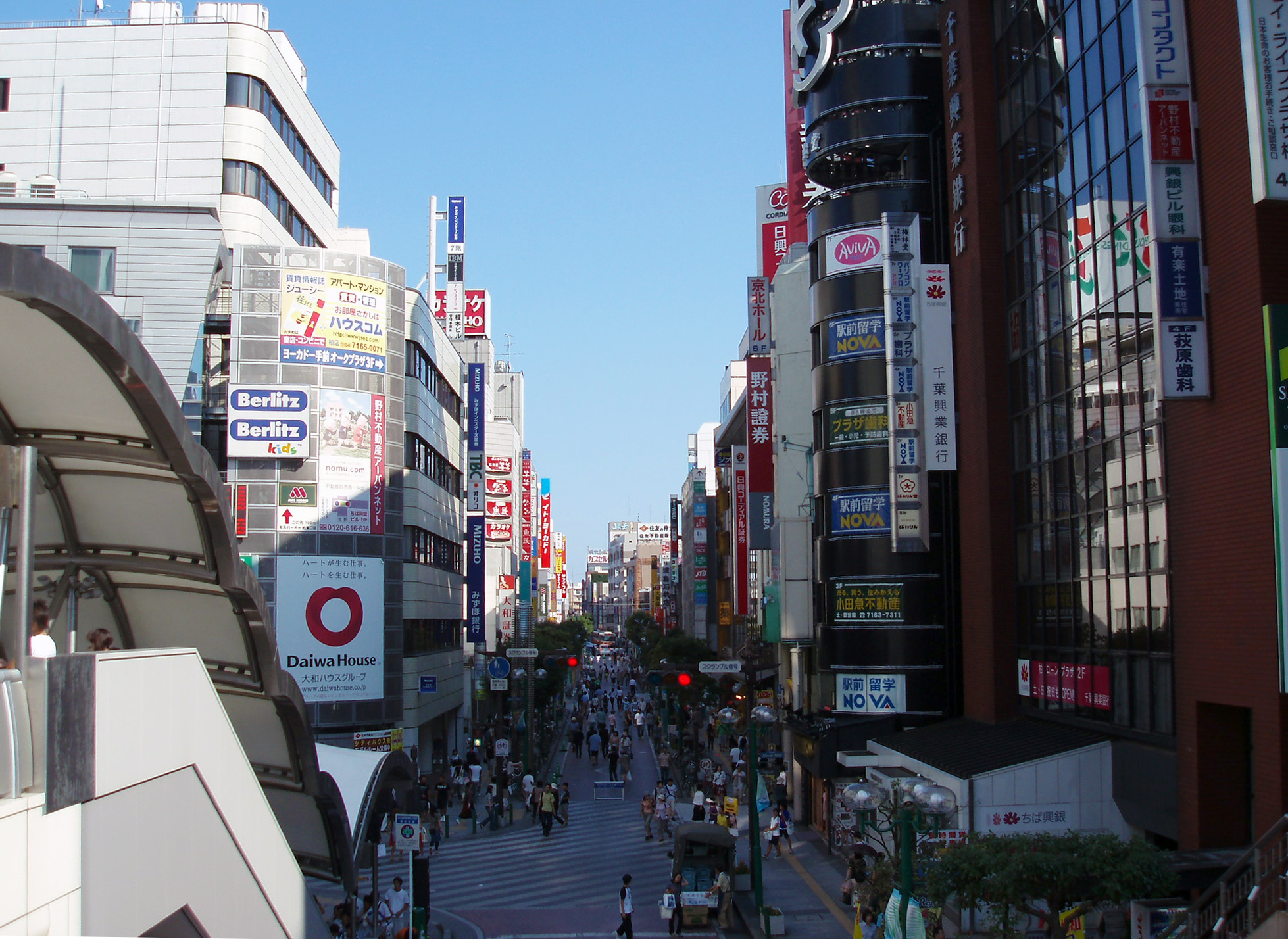 東口駅前通り（ハウディ・モール）